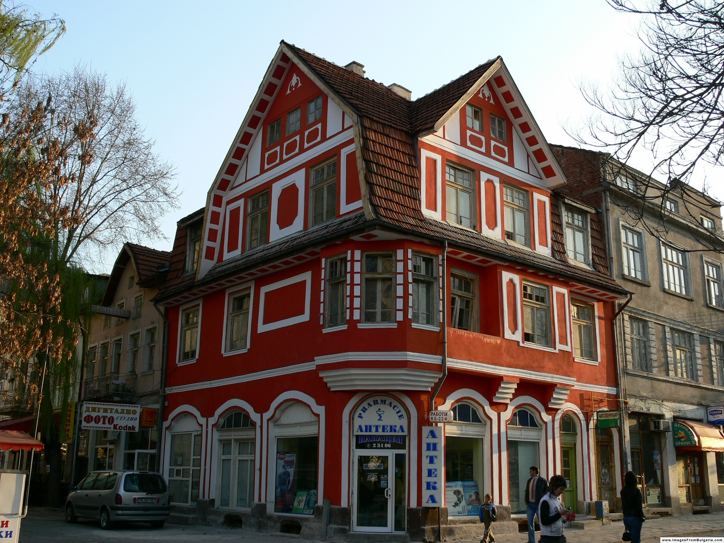 House in Kyustendil, Bulgaria